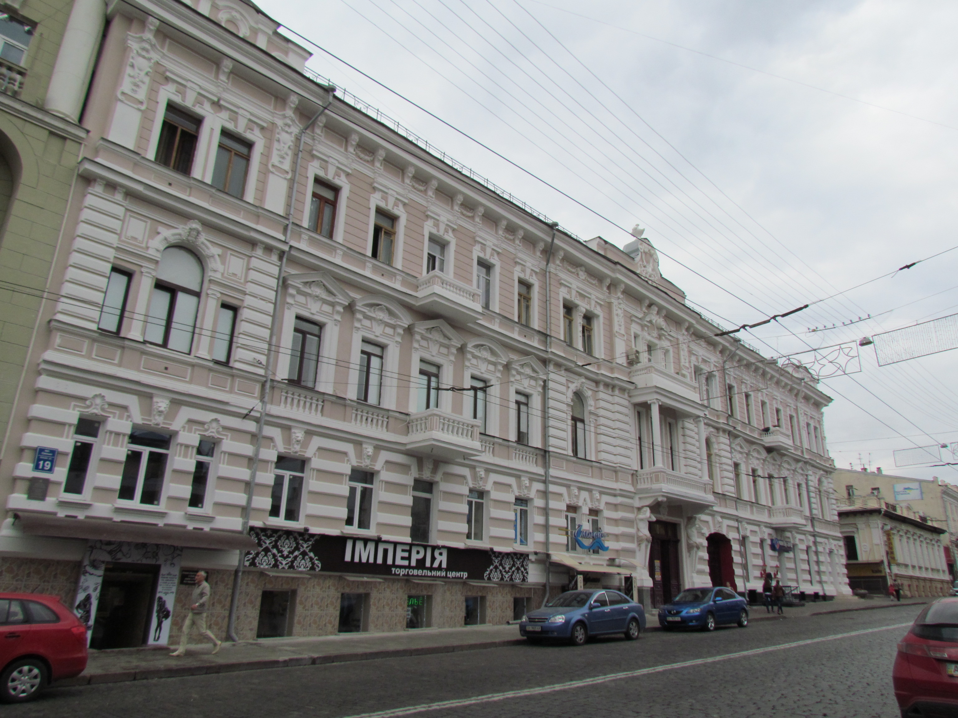 Україна, Харків, вул. Сумська, 19